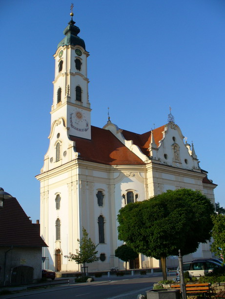 Bad Schussenried Steinhausen Dorfkirche selbst fotografiert von user:Enslin am 24.9.2005